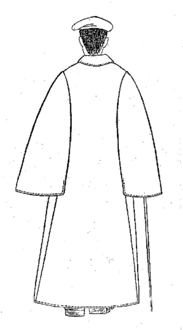 とんびコート